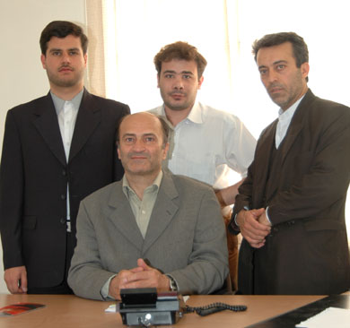 اعضاي هيئت موسس انجمن صنفي مترجمان ايران